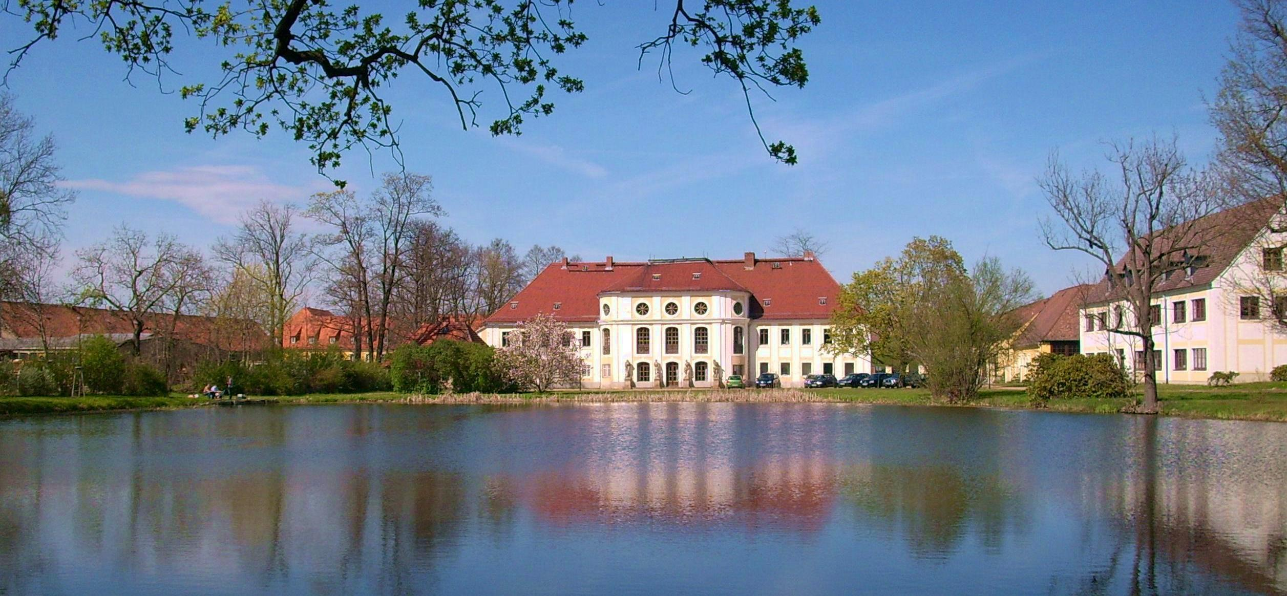 Schloss und Schlossteich in Königswartha